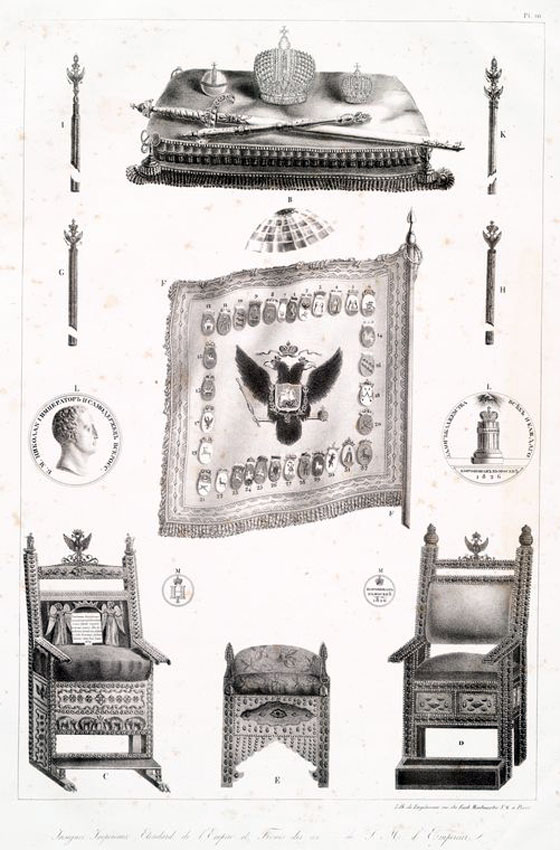 Символы государственной власти